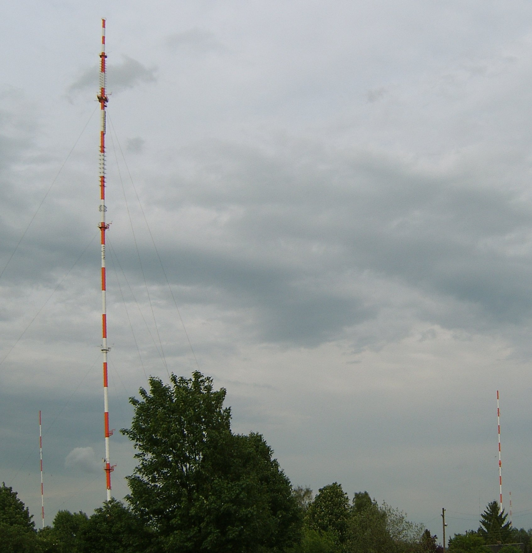 Sendeanlage in Billbrook/Moorfleet, Hamburg: Im Vordergrund der 304 m FM-Turm; im Hintergrund links der MW-Reservemast, rechts der im Betrieb befindliche MW-Mast und dahinter der MW-Reflektormast